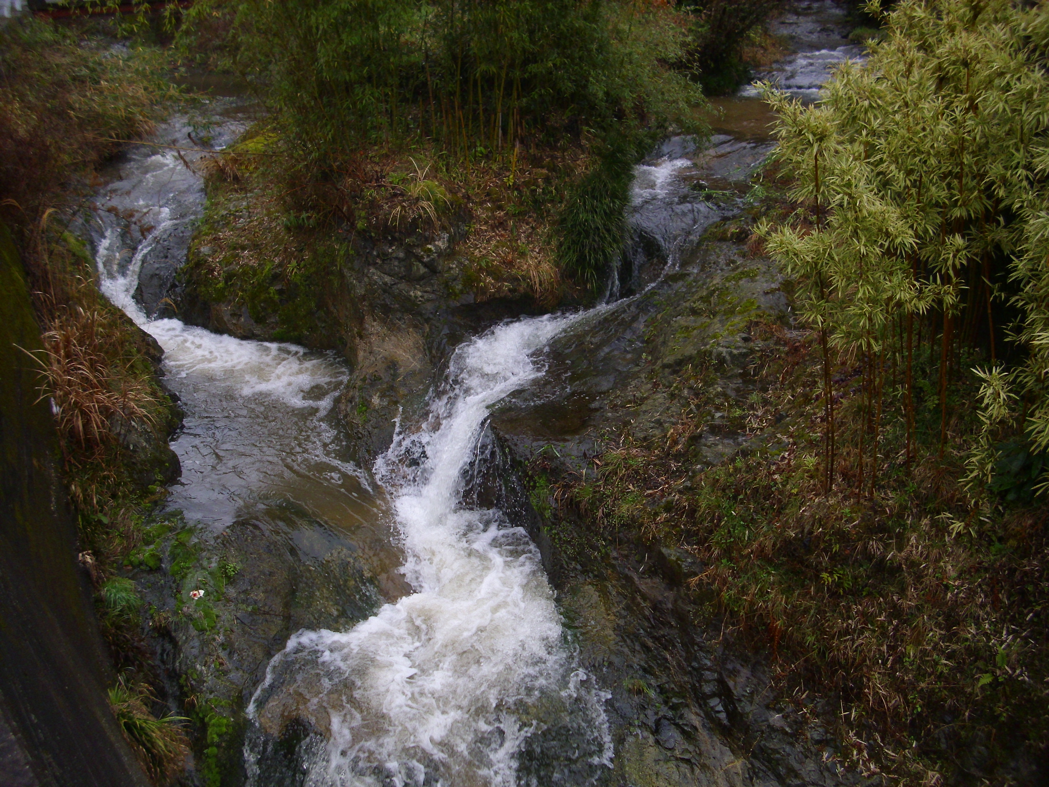 重要文化的景観「奥飛鳥」ー栢森集落内で二つの沢が合流し飛鳥川となる